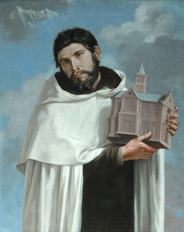 San Agabo en hábito de carmelita